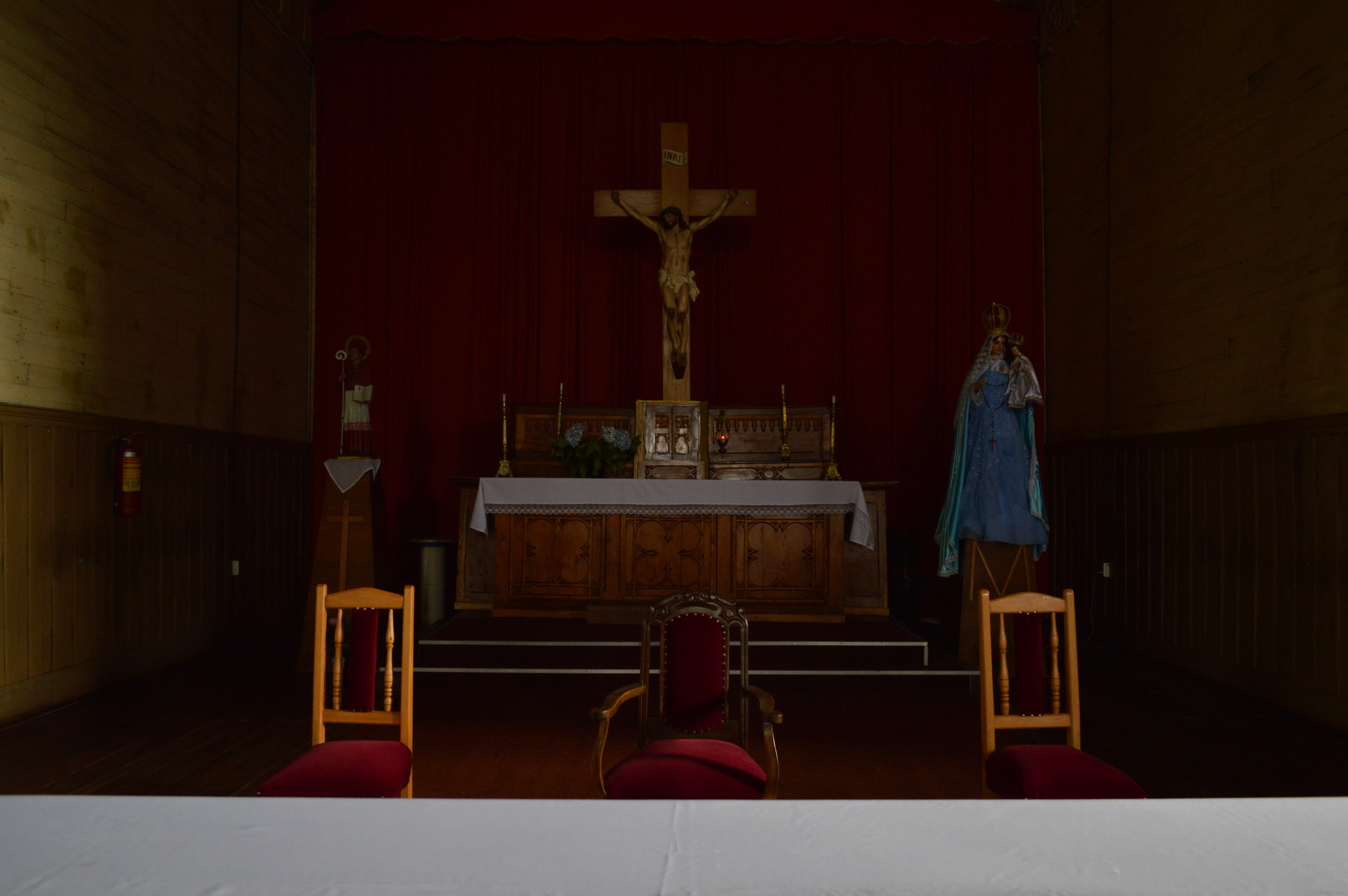 Altar Principal Iglesia de Chonchi